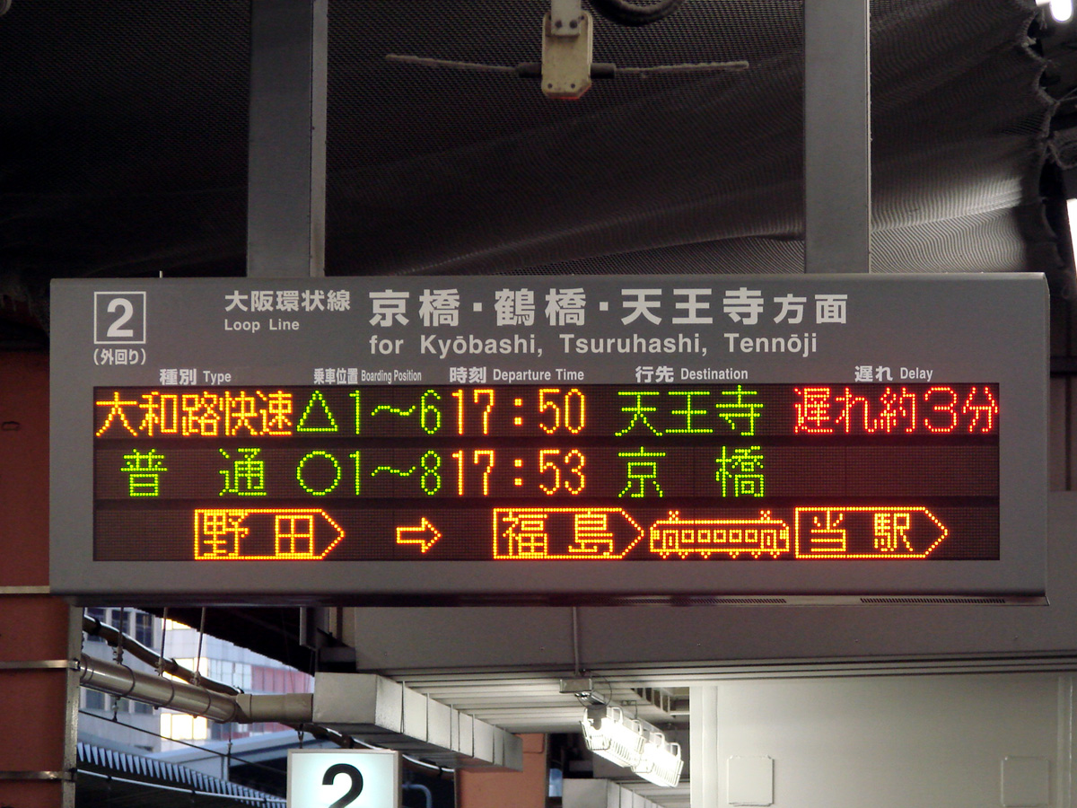 大阪駅 発車標での在線表示